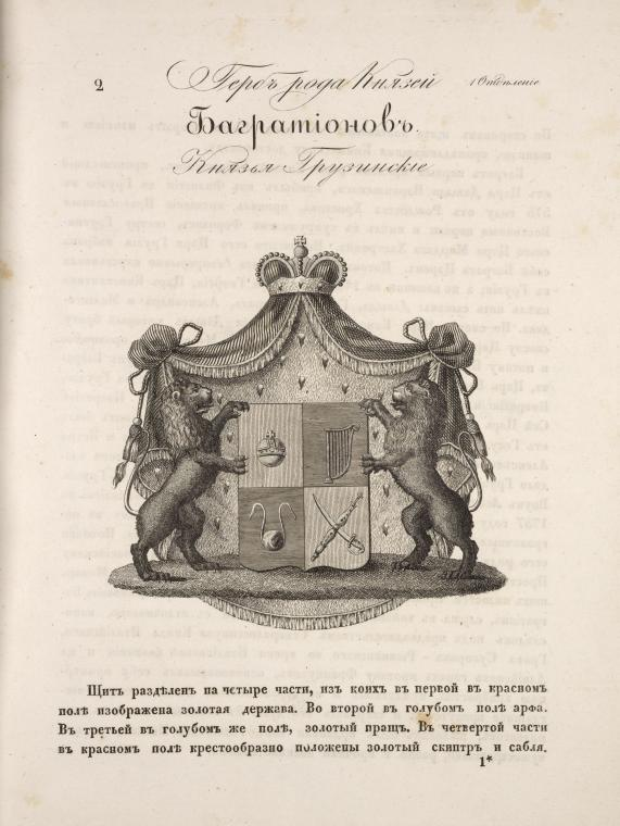 Gerb roda Kniazei Bagrationovykh. Kniaz'ia Gruzinskie.